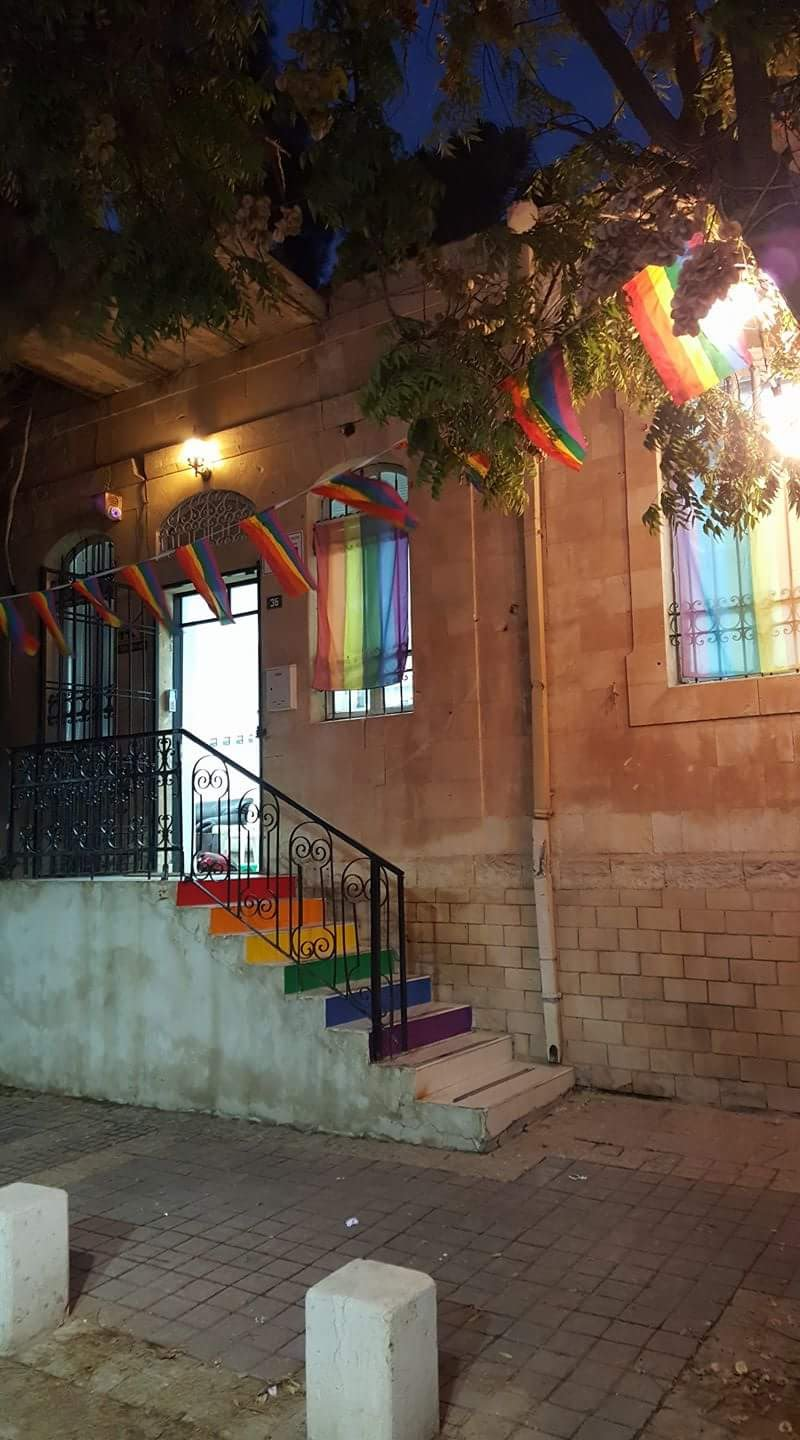 The pride house of Be'er Sheva, 2017